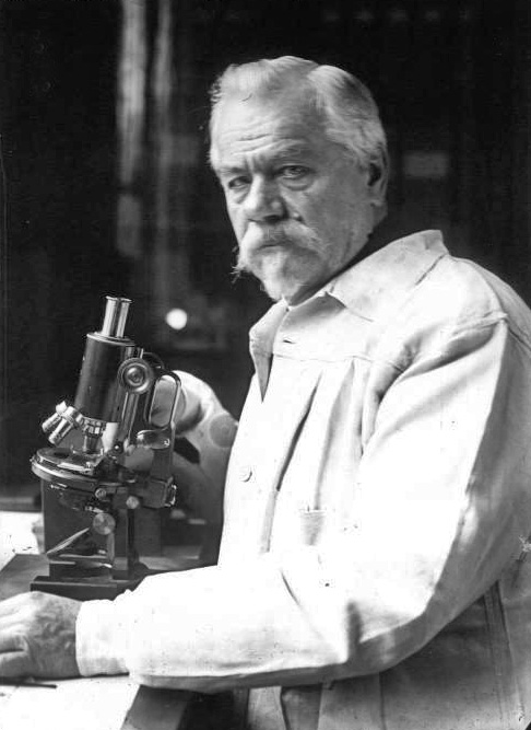 M. Mangin, directeur du Muséum dans son laboratoire : photographie de presse